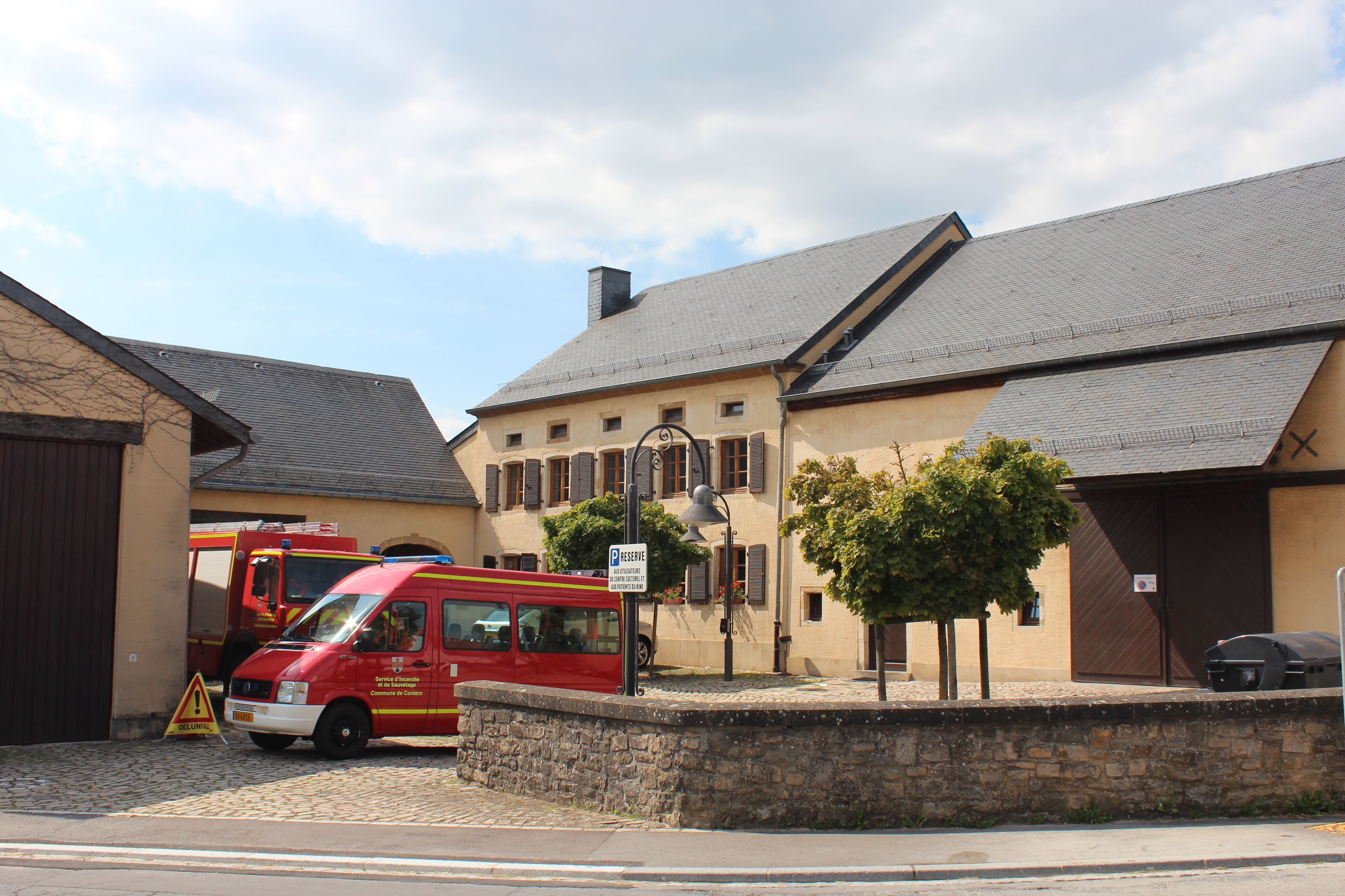 Gebaier op Nummer 1, Lëtzebuergerstrooss zu Conter. Haut ë. a. Centre culturel a Sprëtzenhaus. Zënter dem 19. Juli 1982 op der Lëscht vum Zousaz-Inventaire vun den nationale Monumenter agedroen.